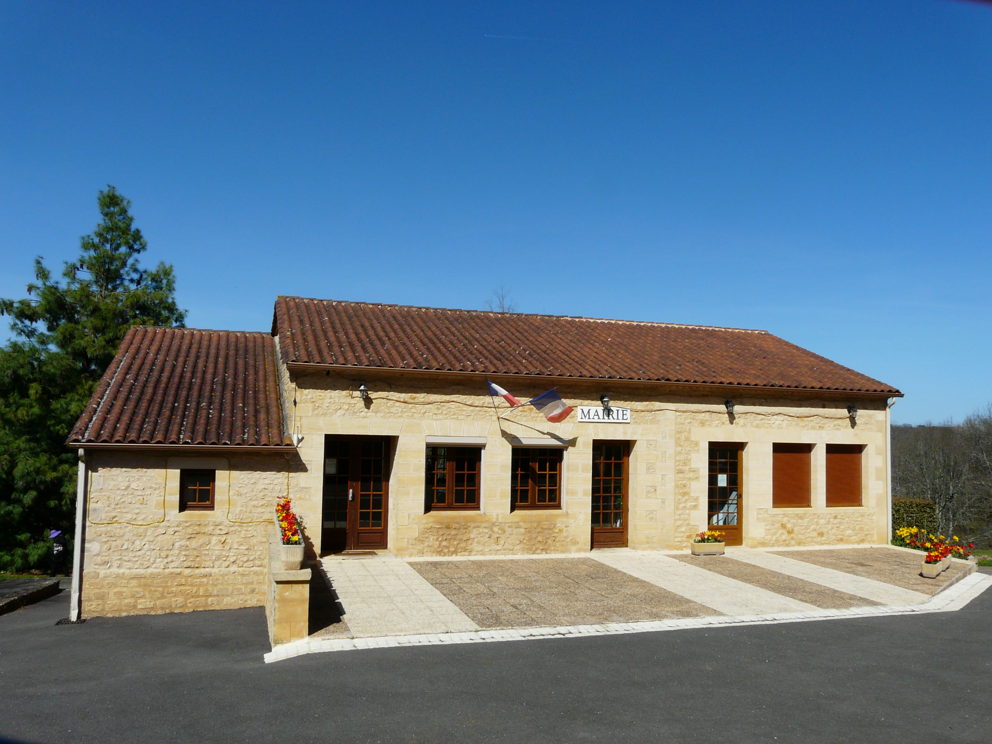 La mairie de Saint-Avit-de-Vialard, Dordogne, France.